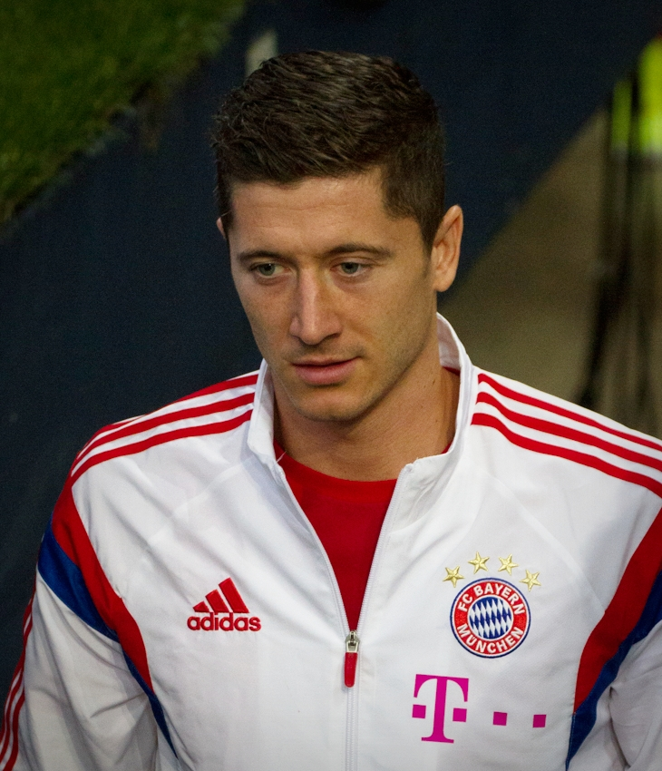 Robert Lewandowski with Bayern Munich in August 2014.